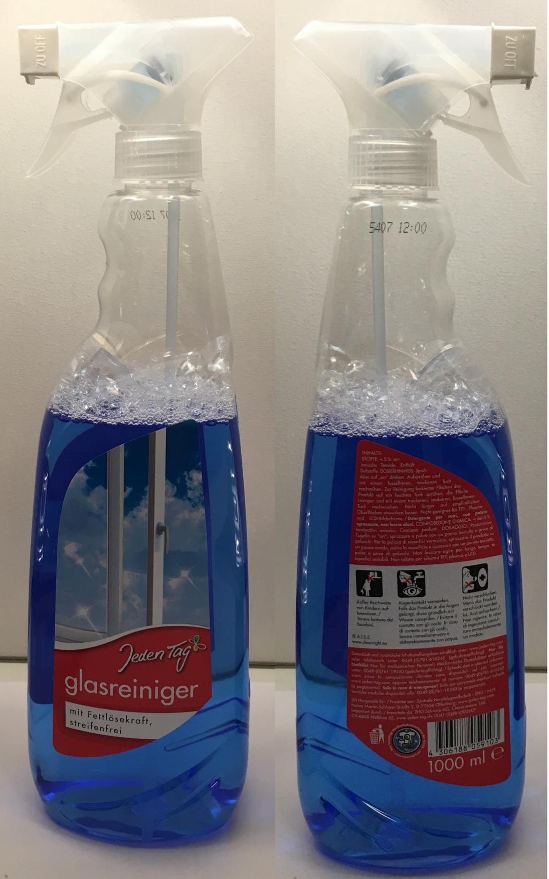 Glasreiniger Sprühflasche